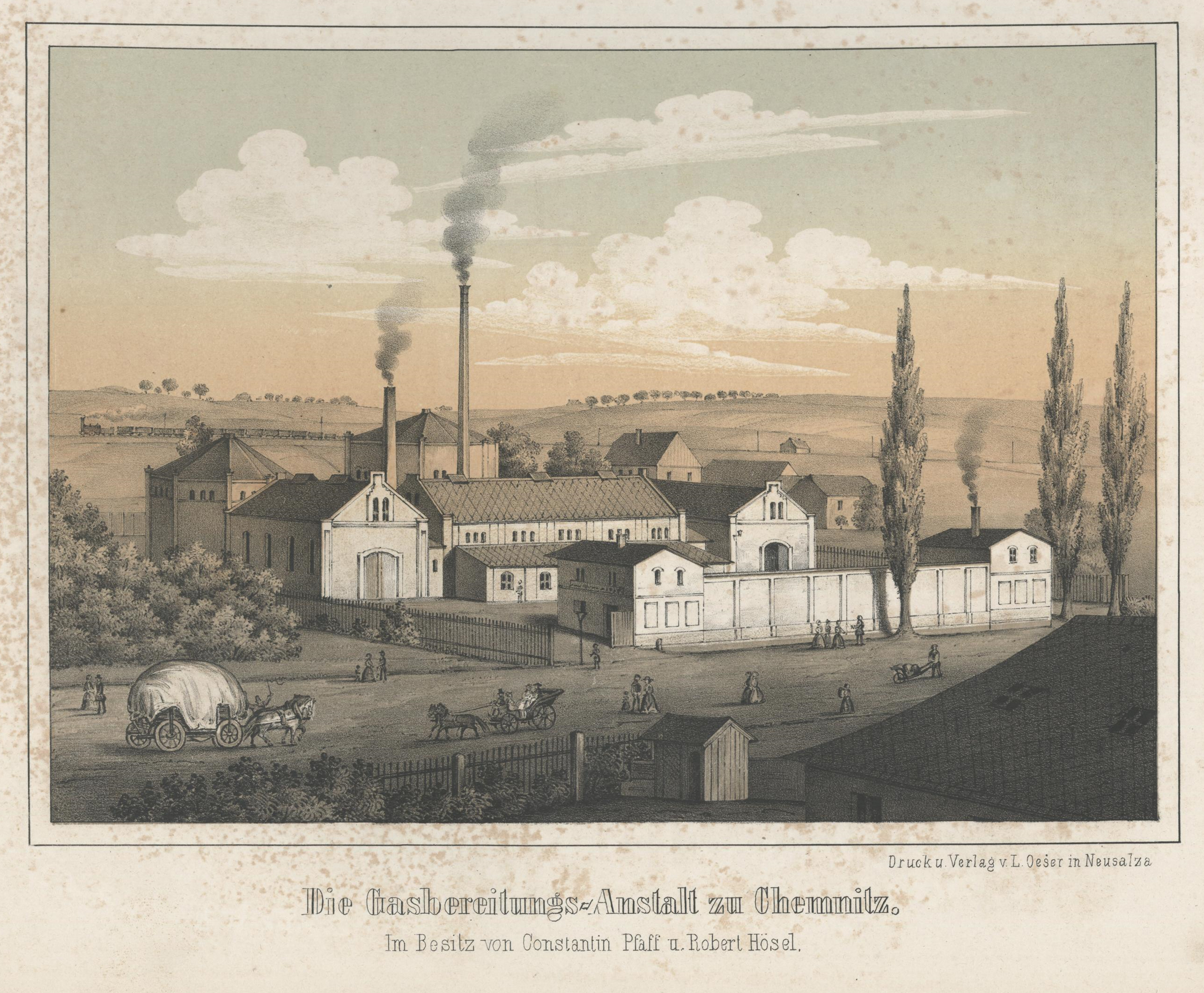 Die Gasbereitungs-Anstalt zu Chemnitz im Besitz von Constantin Pfaff und Robert Hösel aus: Album der Sächsischen Industrie Zweiter Band